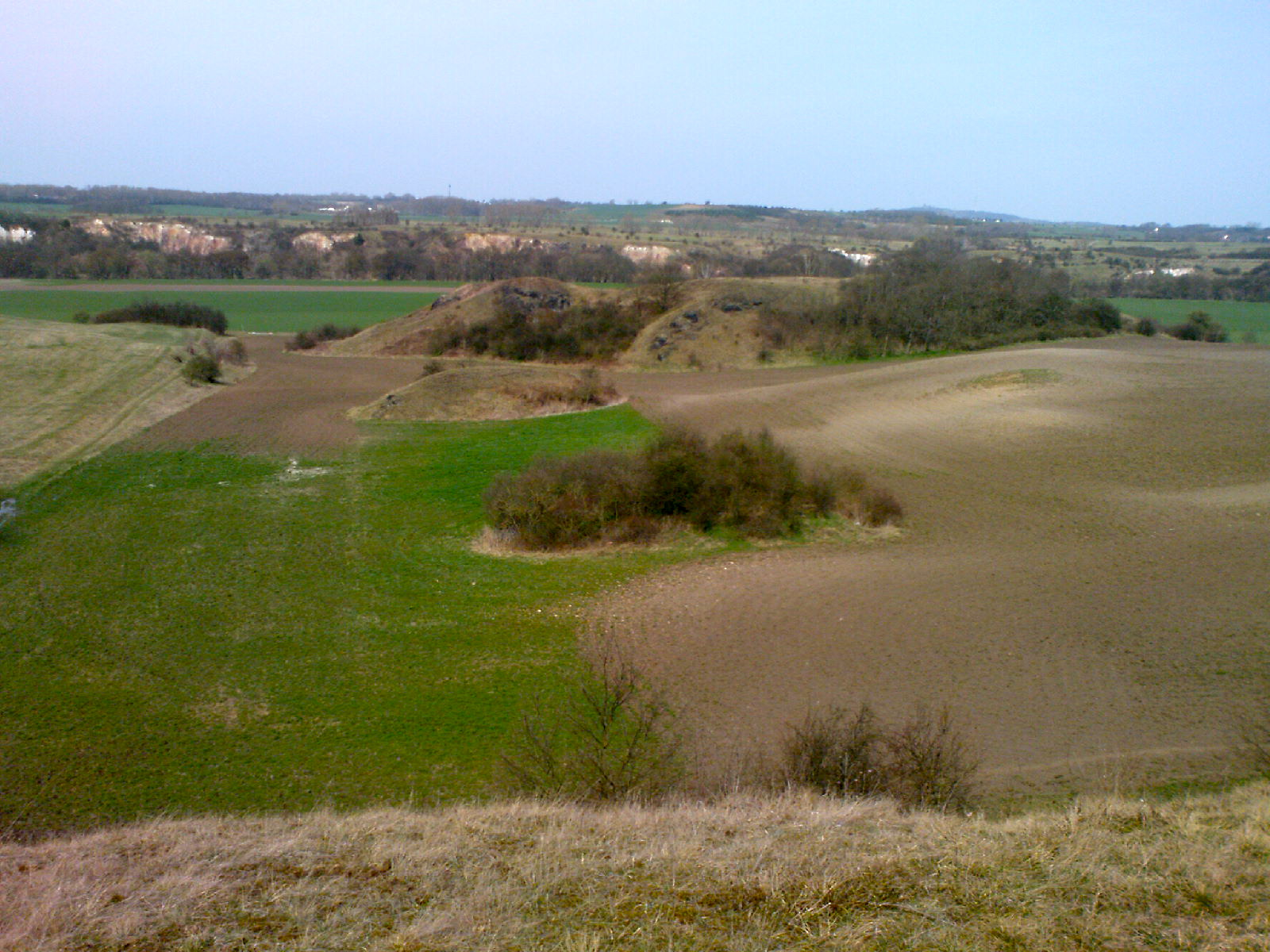 Blick vom Lunzberg auf die östlichen Lunzberge in Richtung Nordosten (im Hintergrund die Saaleaue, die Brachwitzer Alpen und der Petersberg)